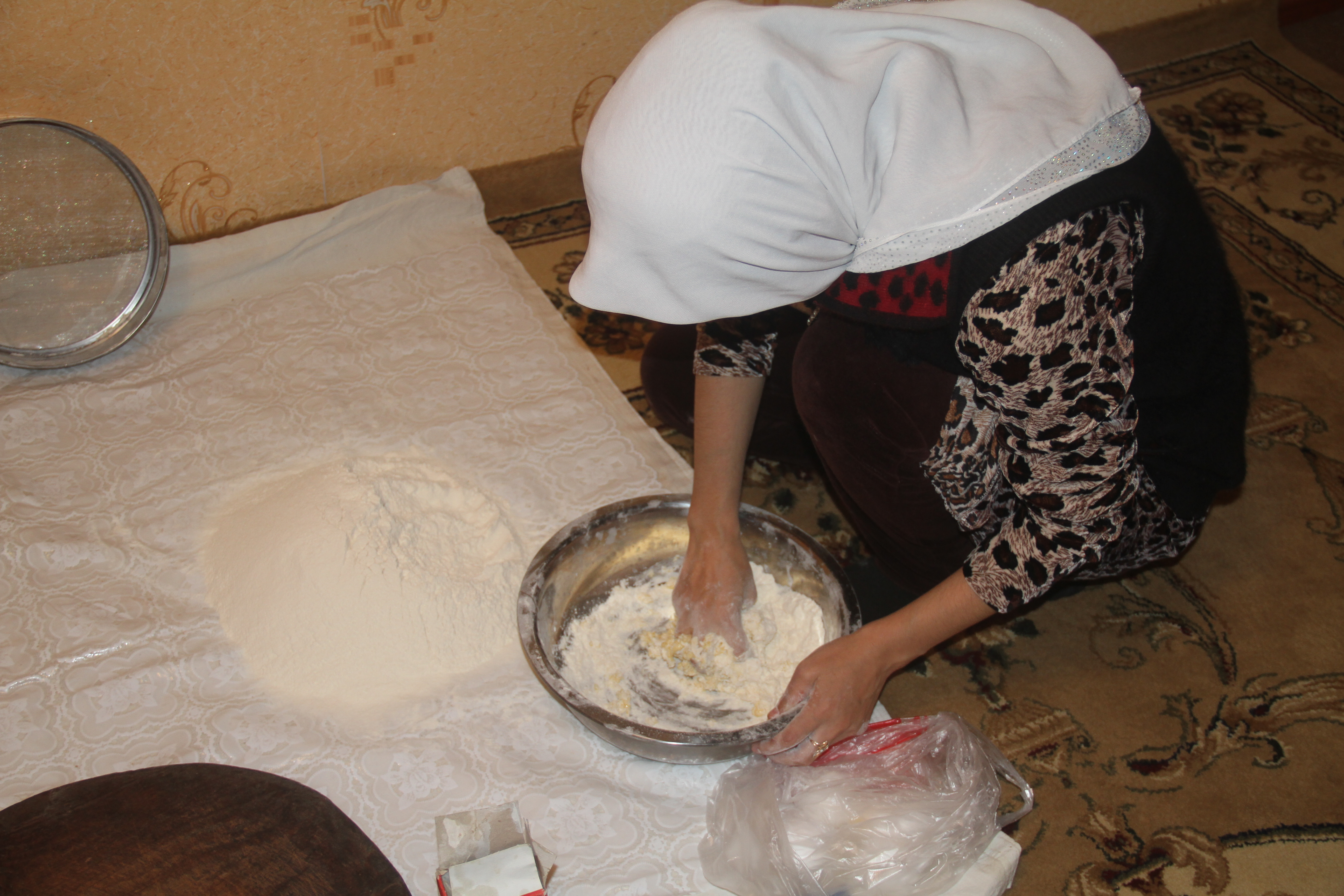 Тоҷикӣ: Чак-чак (3)